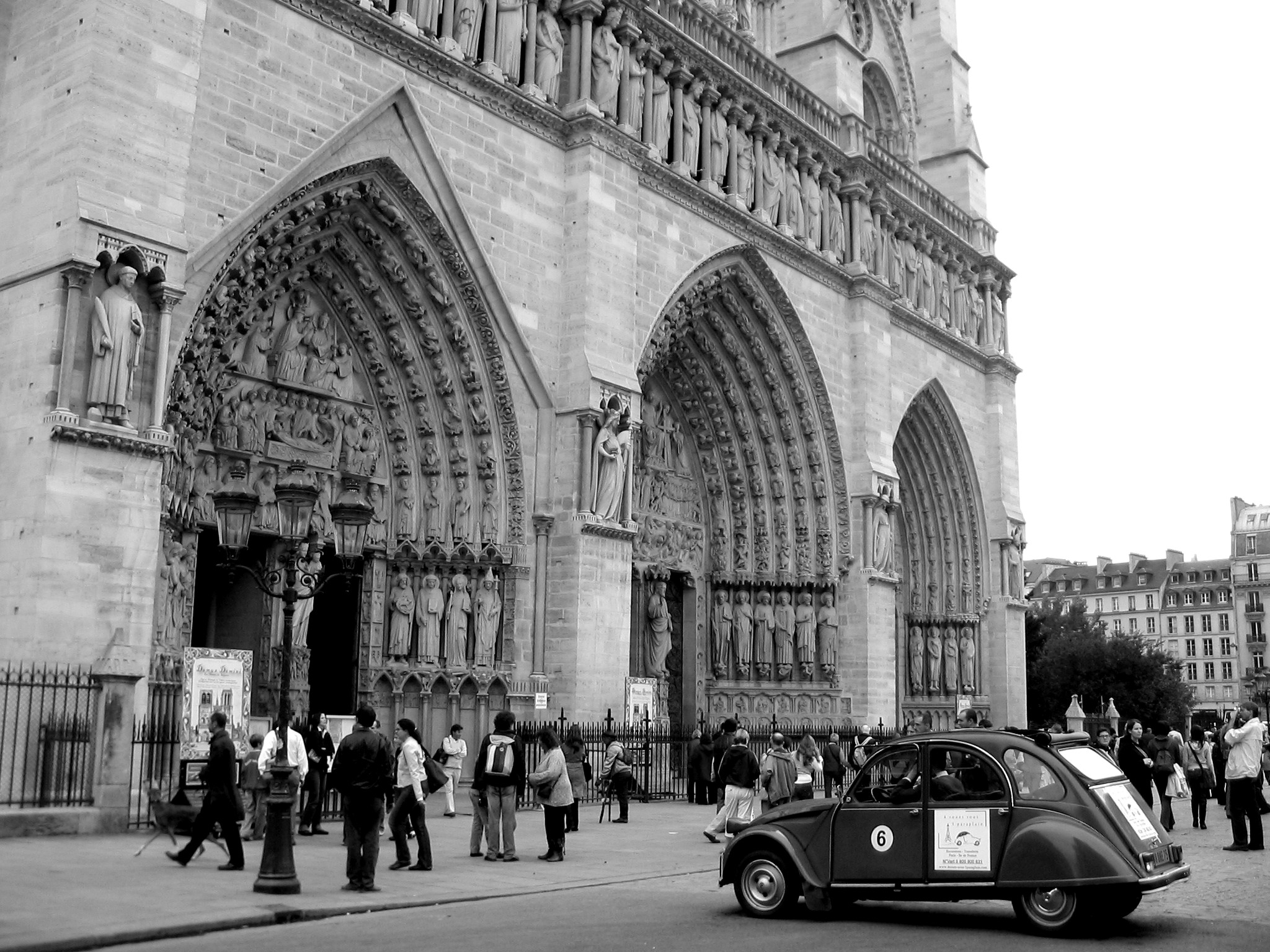 Facade Ouest de Notre-Dame de Paris;Contraste accentué/Western facade;decreased contrast